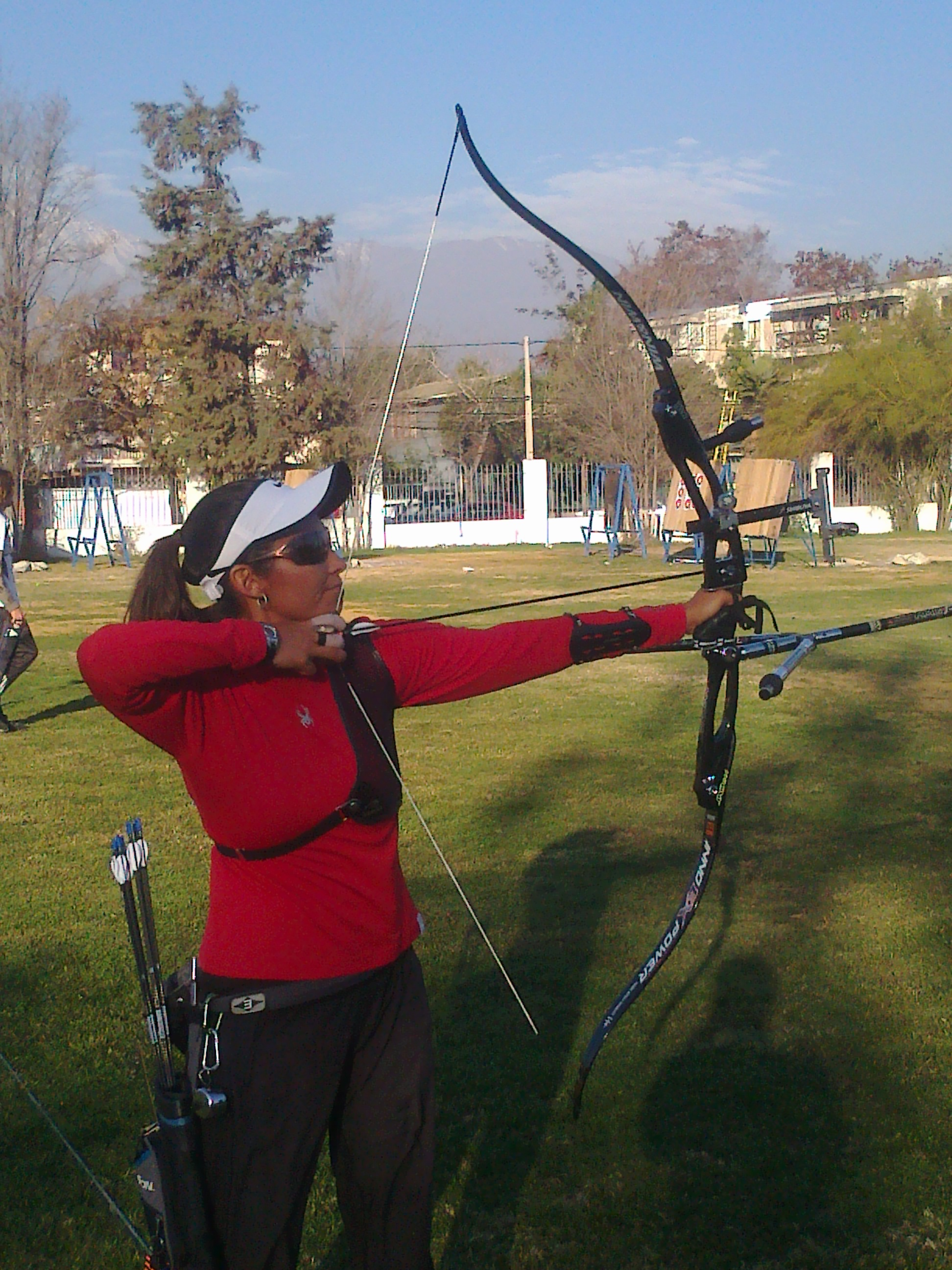 Denisse Van Lamoen fotografiada mientras dispara despues de volver del Campeonato Mundial de Turin 2011, donde resulto campeona, tomada desde mi celular.